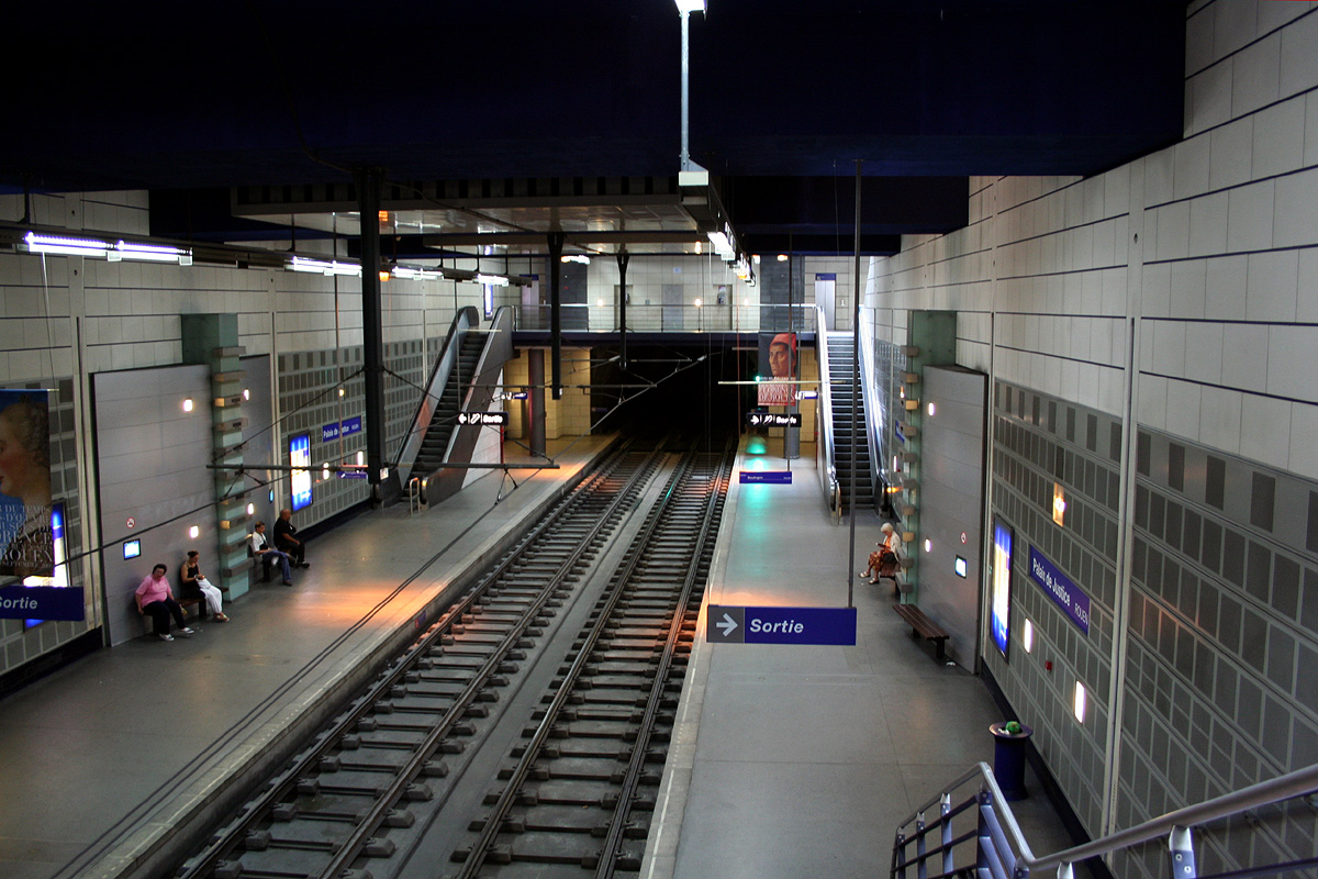 The Metro (station "Palais de justice"), Rouen, France